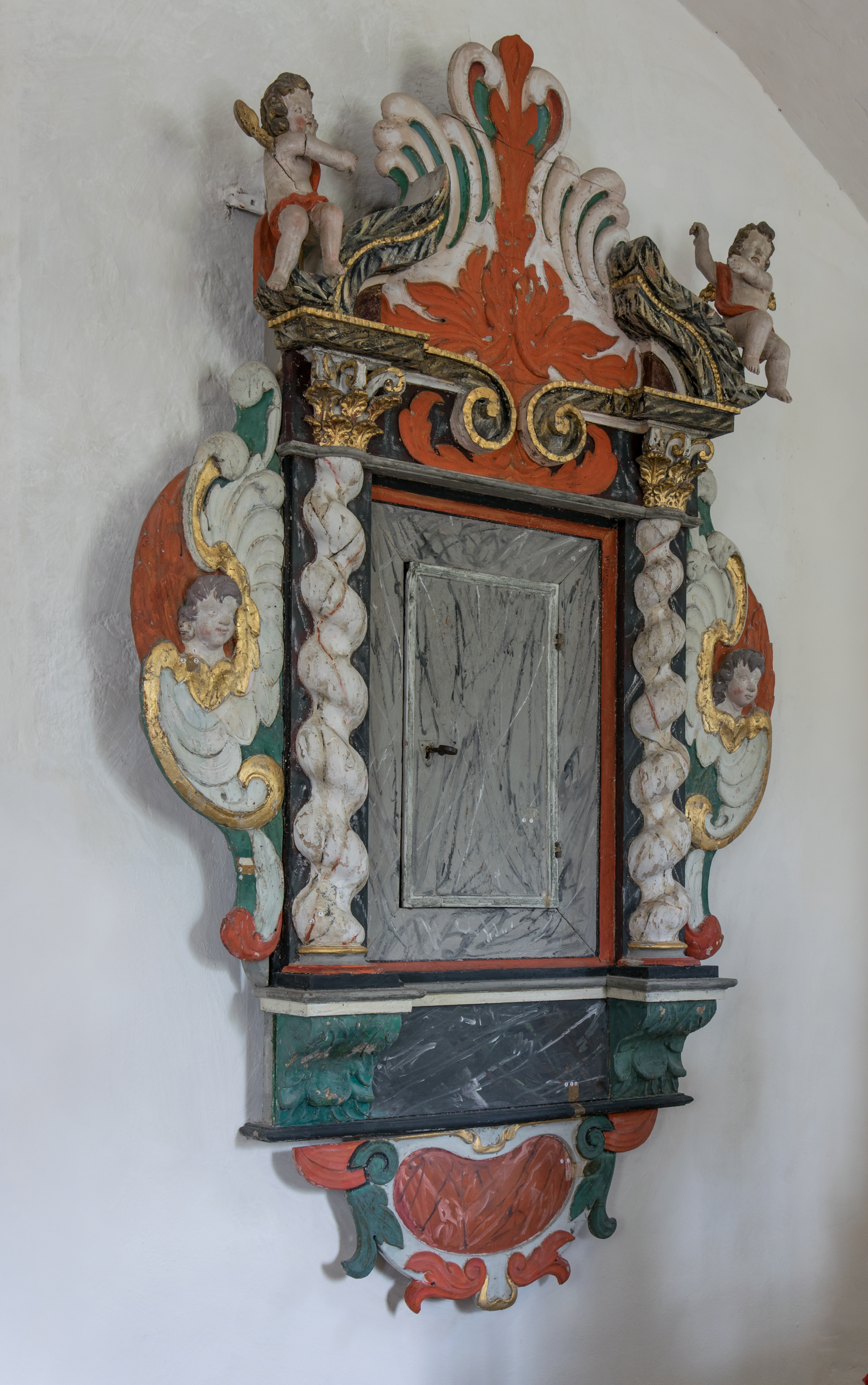 Welleringhausen Abrahamskirche Sakramentsschrank